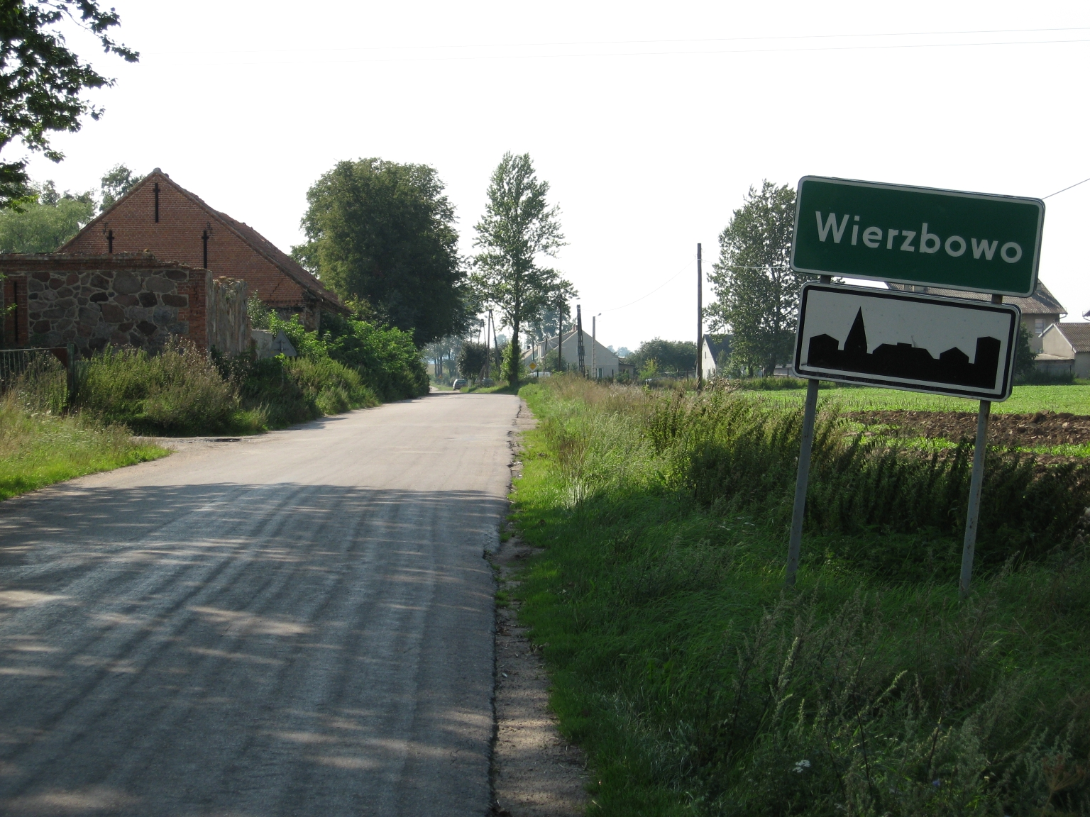 Wierzbowo